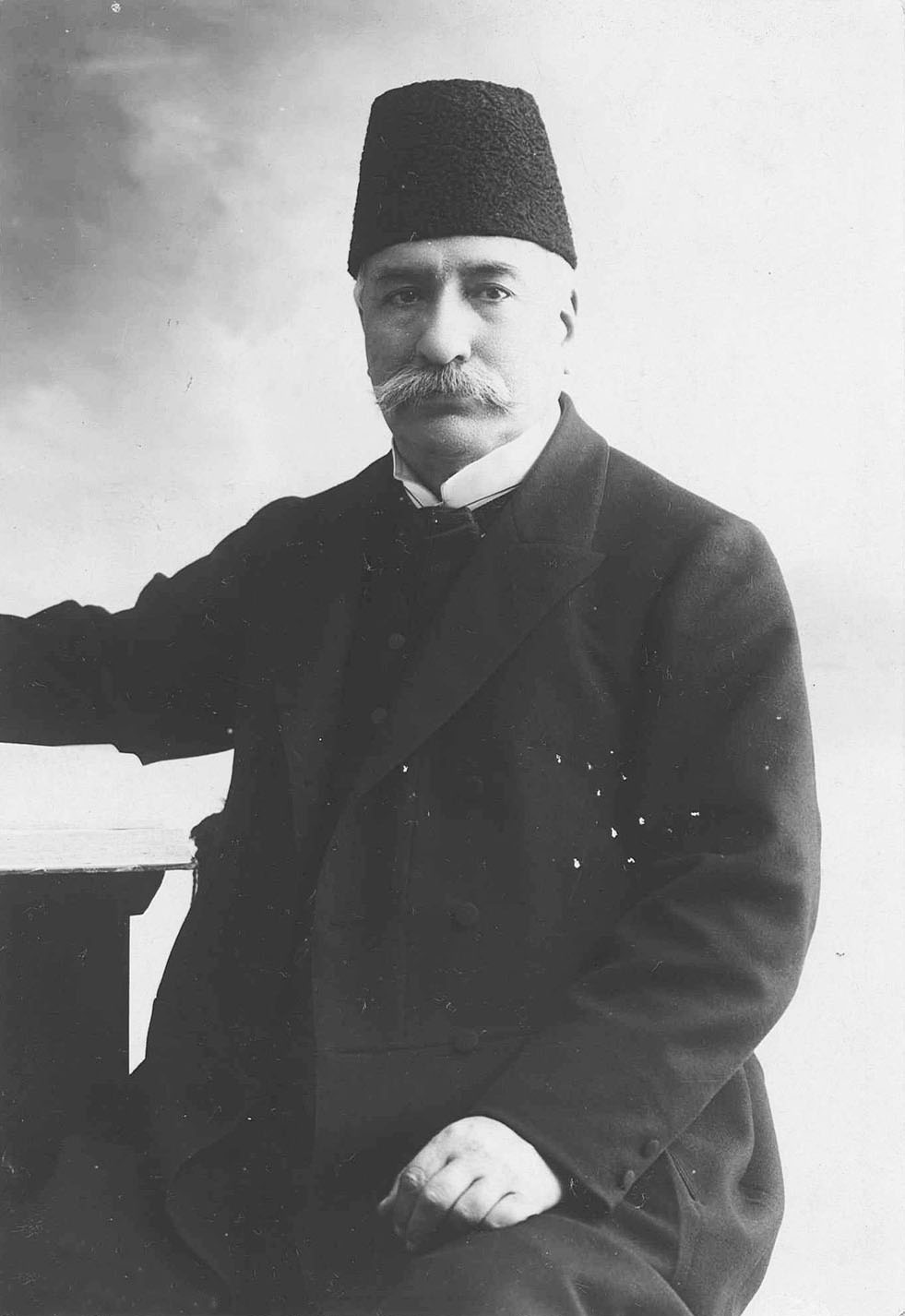 جواد سعدالدوله هشتمین نخست وزیر ایران